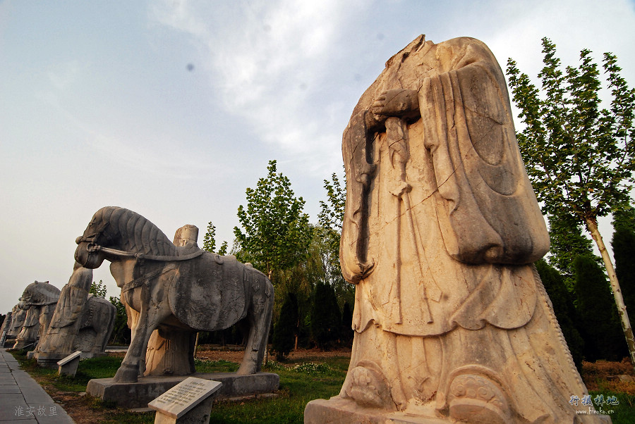 中文（中国大陆）: 明祖陵石翁仲